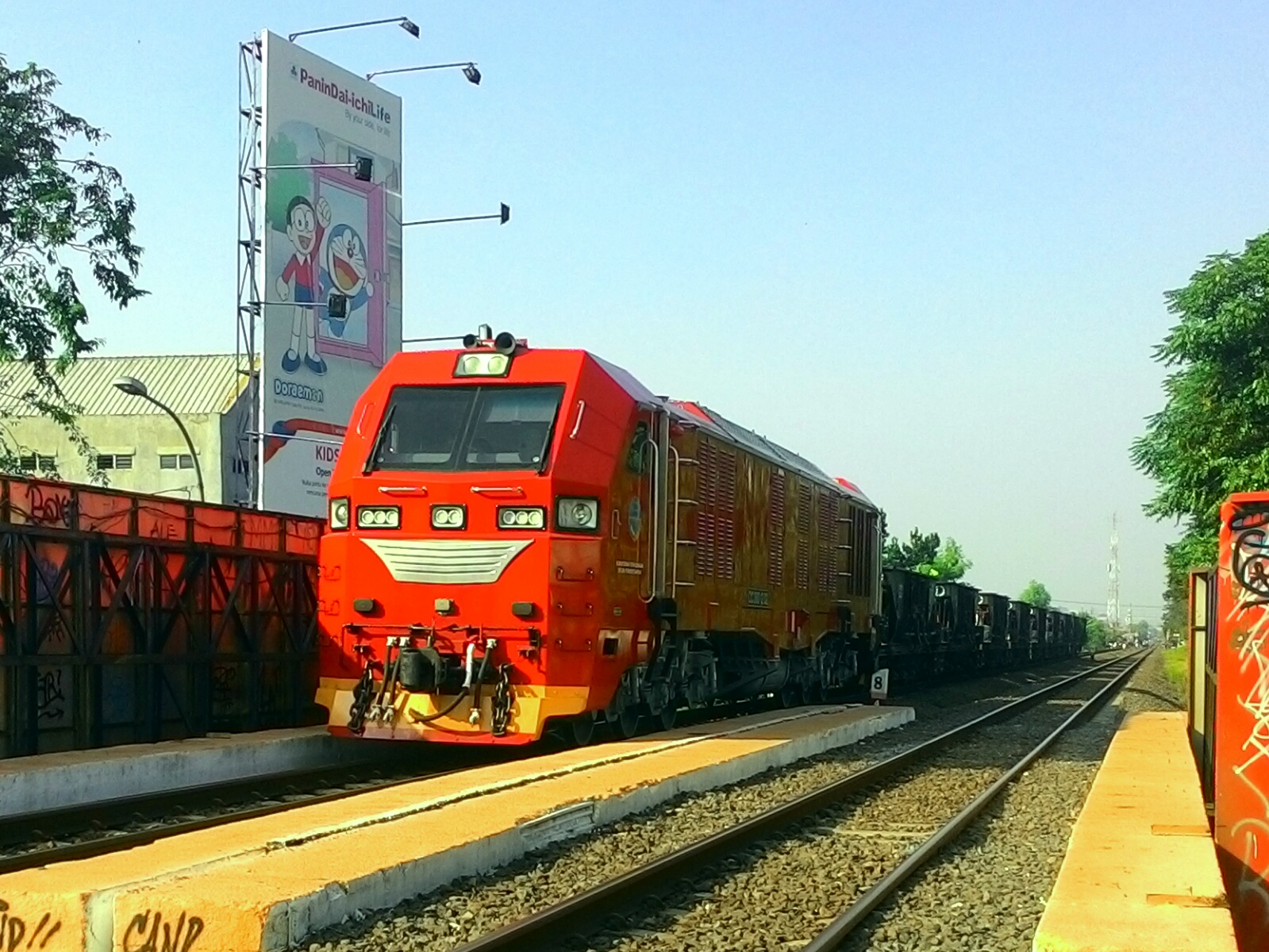 CC 300 12 02 dinas KLB Kricak melintas jembatan viaduk Gubeng Surabaya